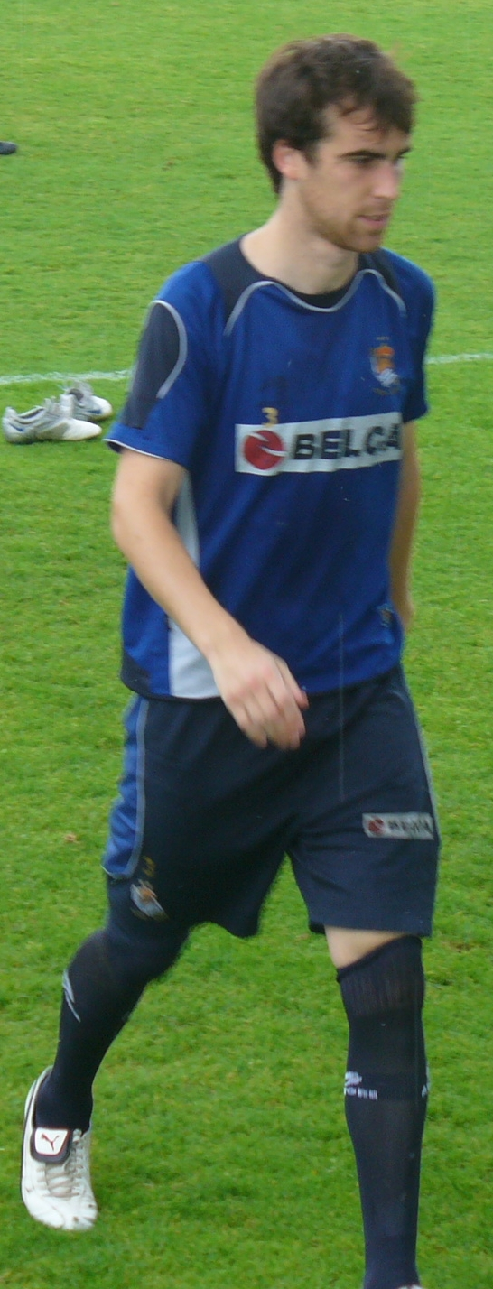 Mikel González en un entrenamiento de la Real Sociedad en Zubieta